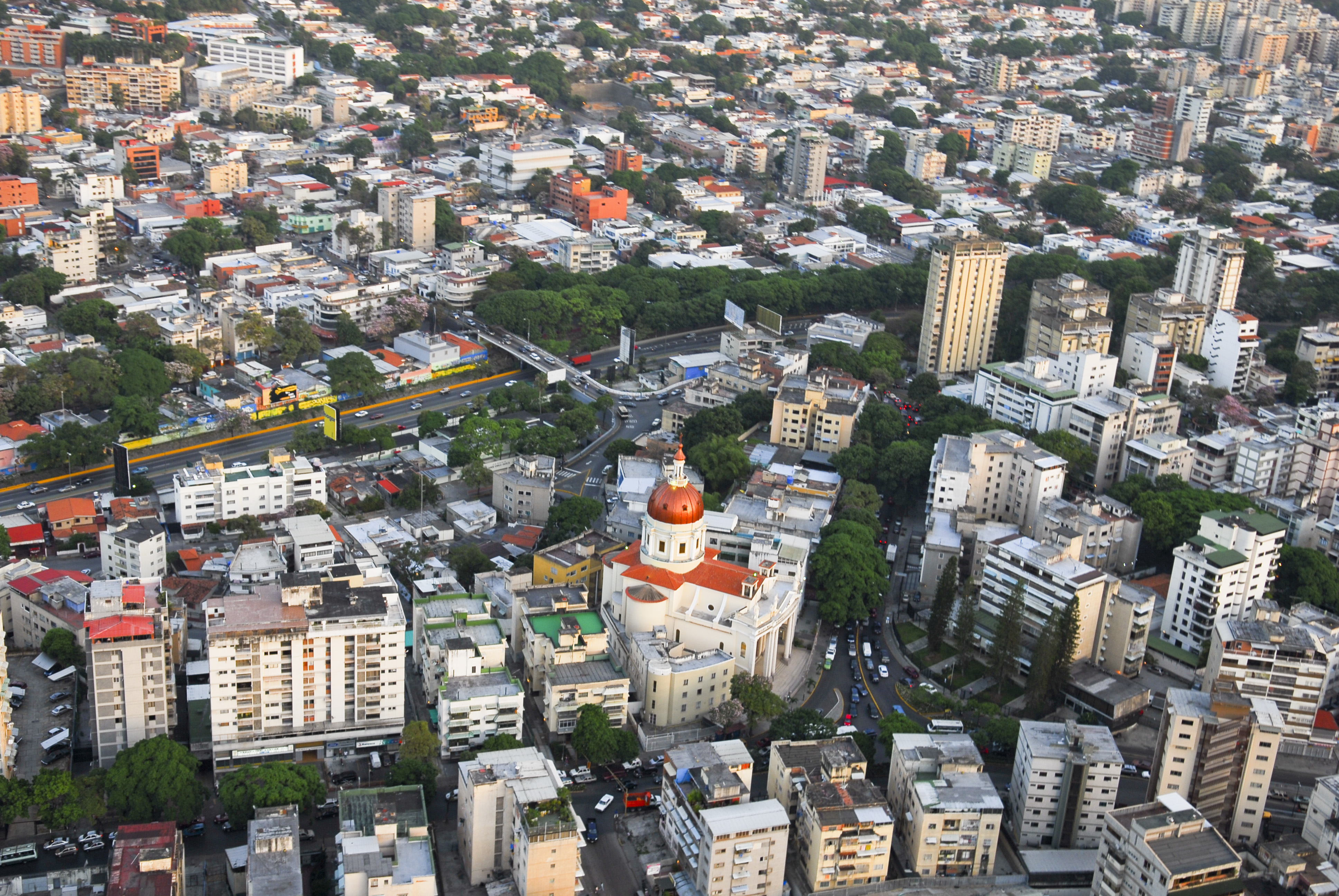 Valle coche, Caracas desde el aire